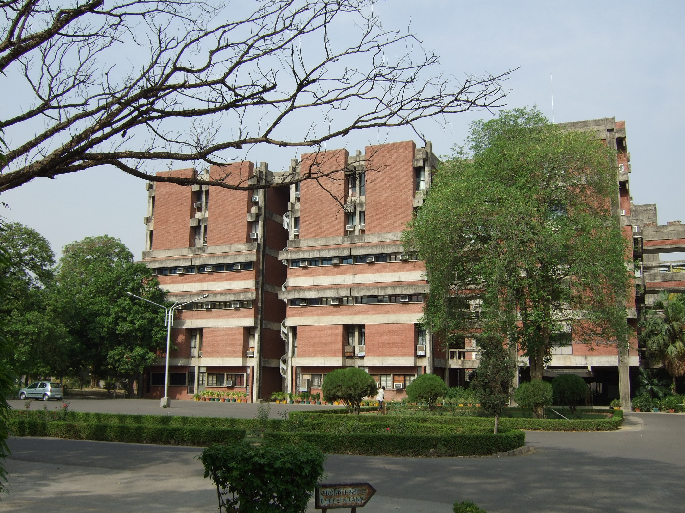 IIT Kanpur